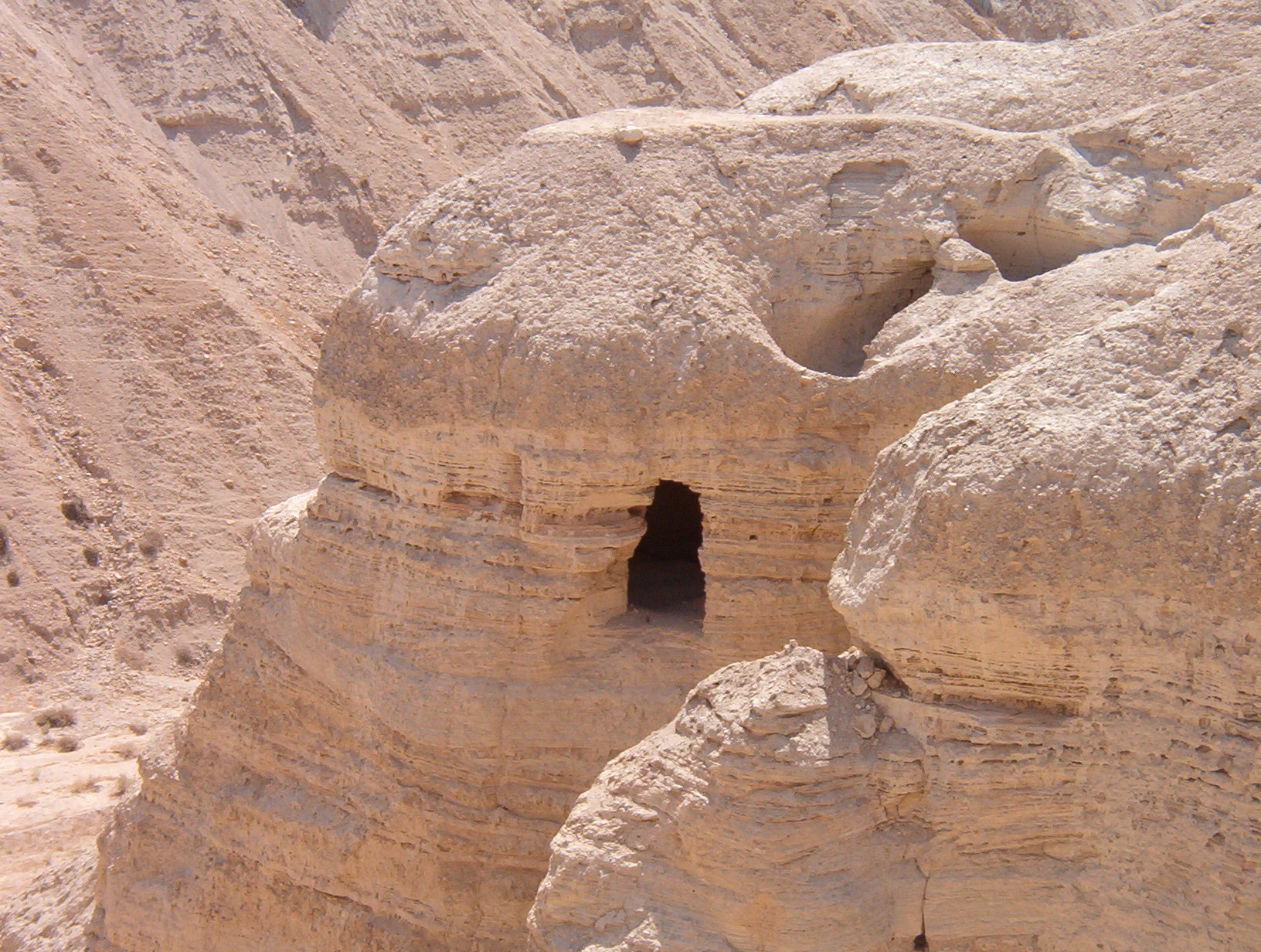 grotta a Qumran in Palestina